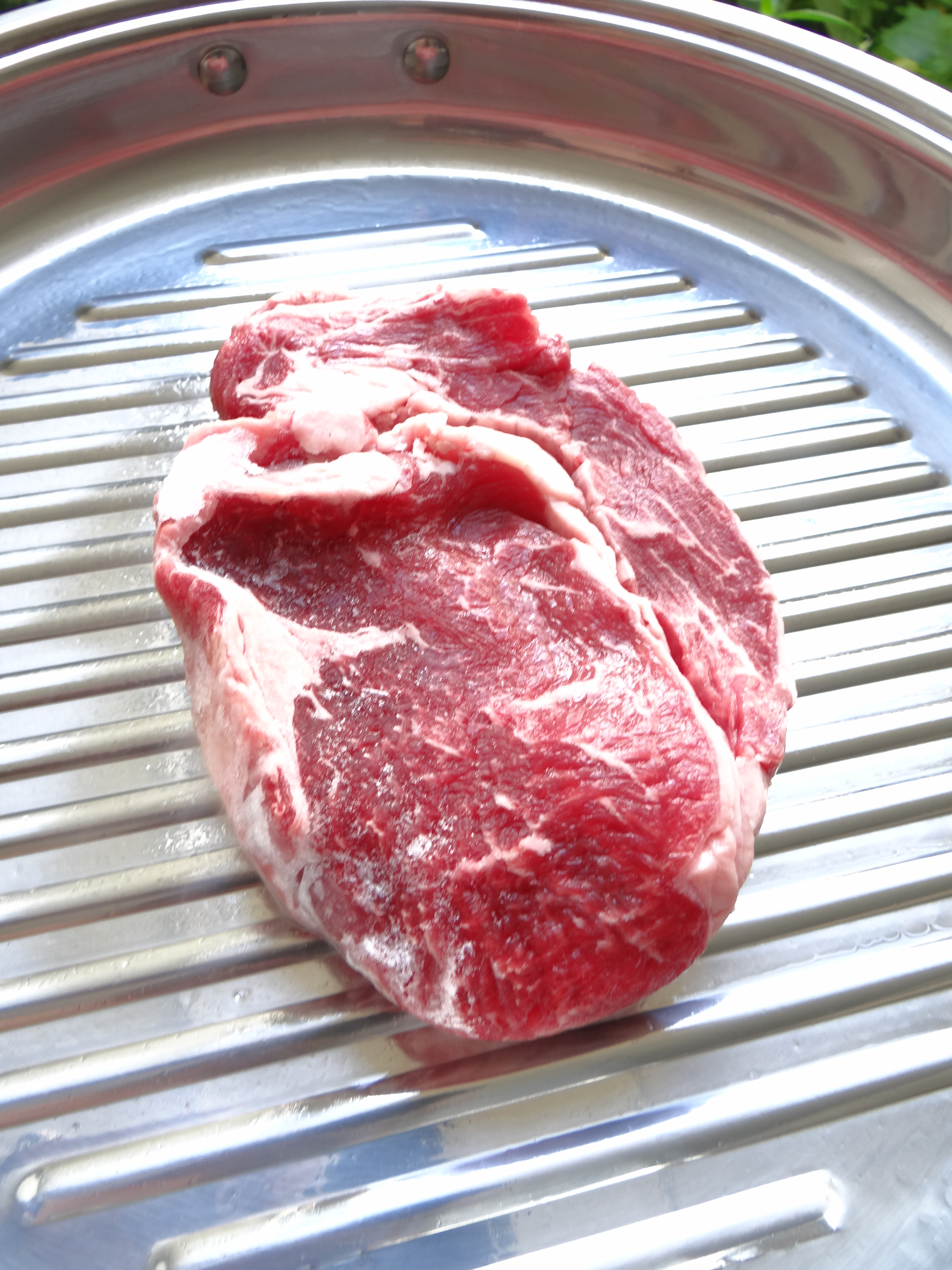 Lomo Delmónico / Ribeye carne de primera calidad, con grasa que le da gran sabor cuando se prepara.